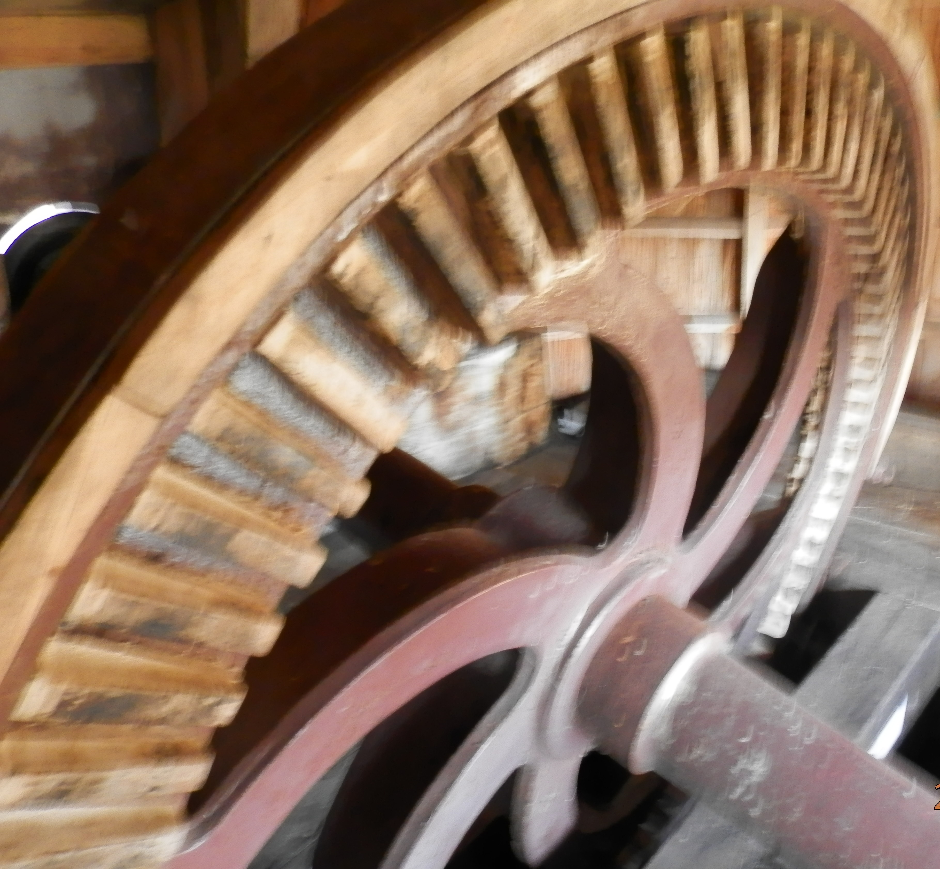 harhjulet i Ramløse Mølle